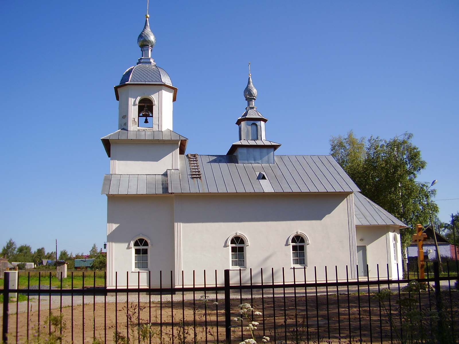 Syvärinniskan kirkko